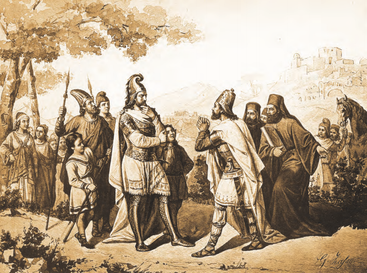 Արշավիր Կամսարականը դիմում է Վարդան Մամիկոնյանին ետ վերադառնալ դեպ Հայոց աշխարհ